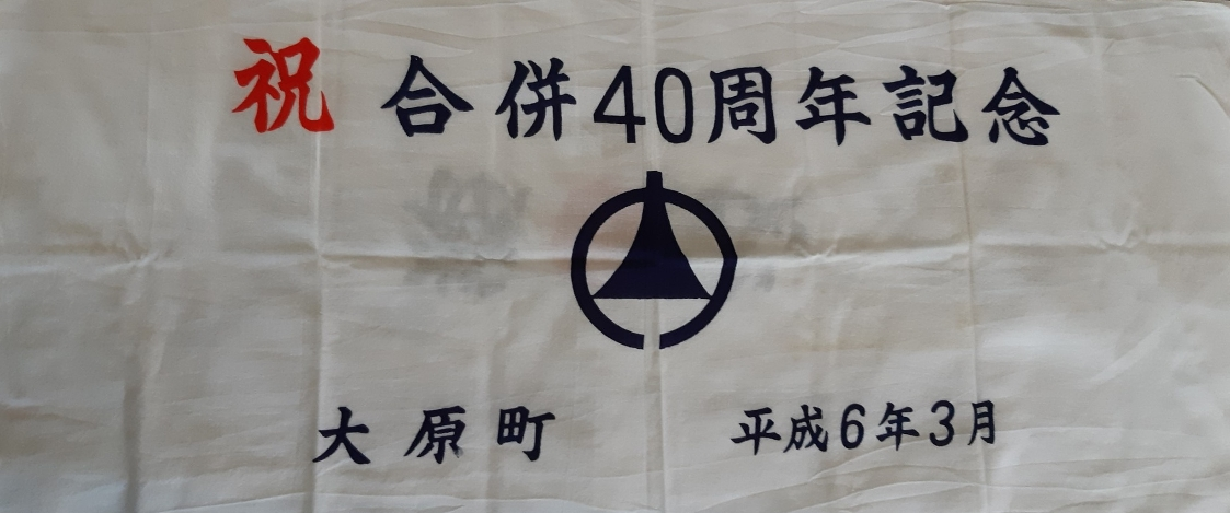 40 ans de la Fédération de kendo